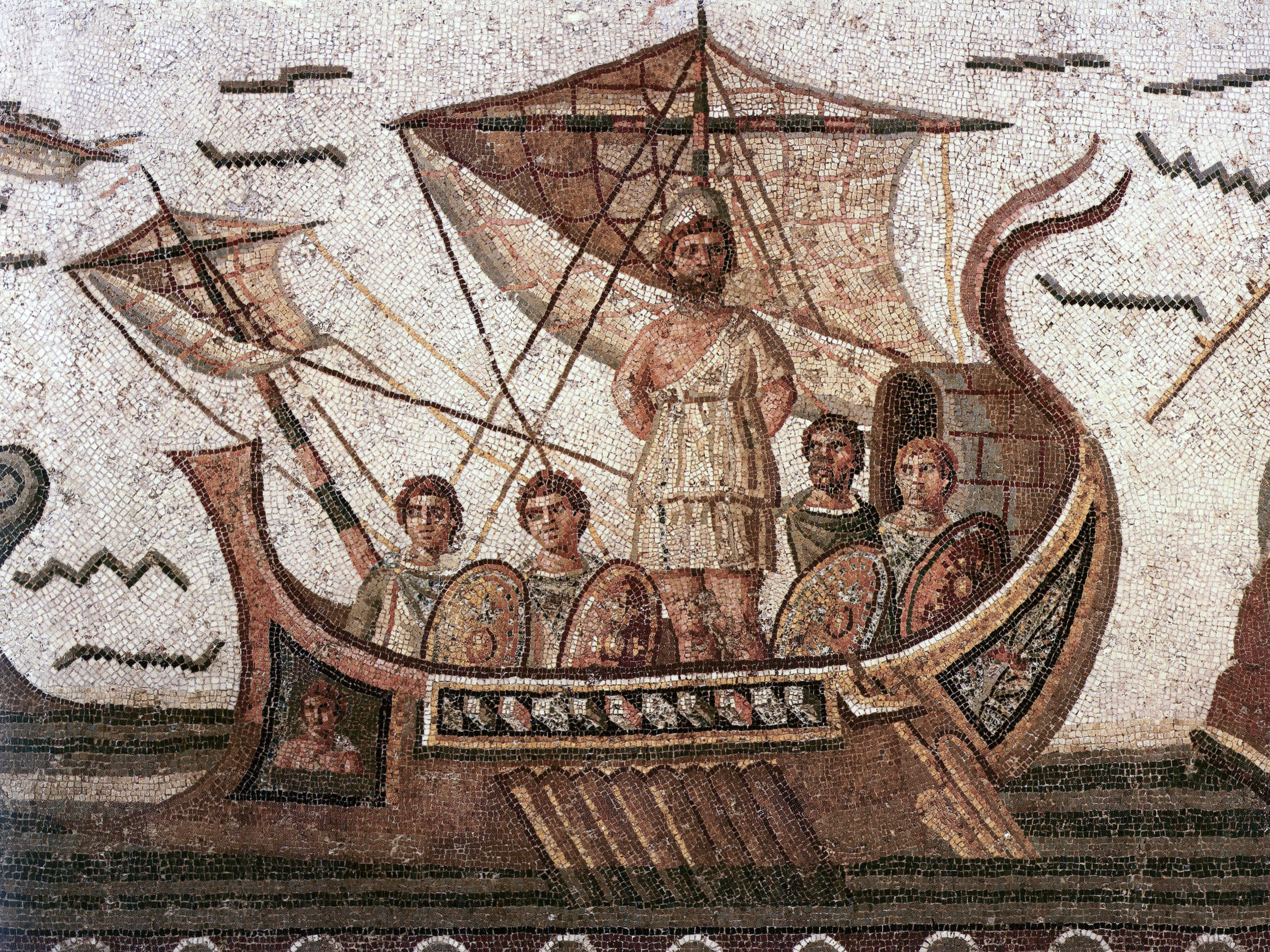 Ulysse attaché au mât de son navire, afin de ne pas succomber au chant des sirènes, mosaïque romaine.